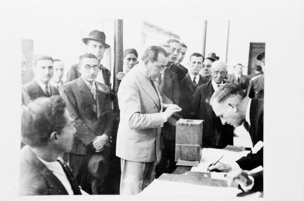 El gobernador de Tucumán, Miguel Campero, votando en una elección.